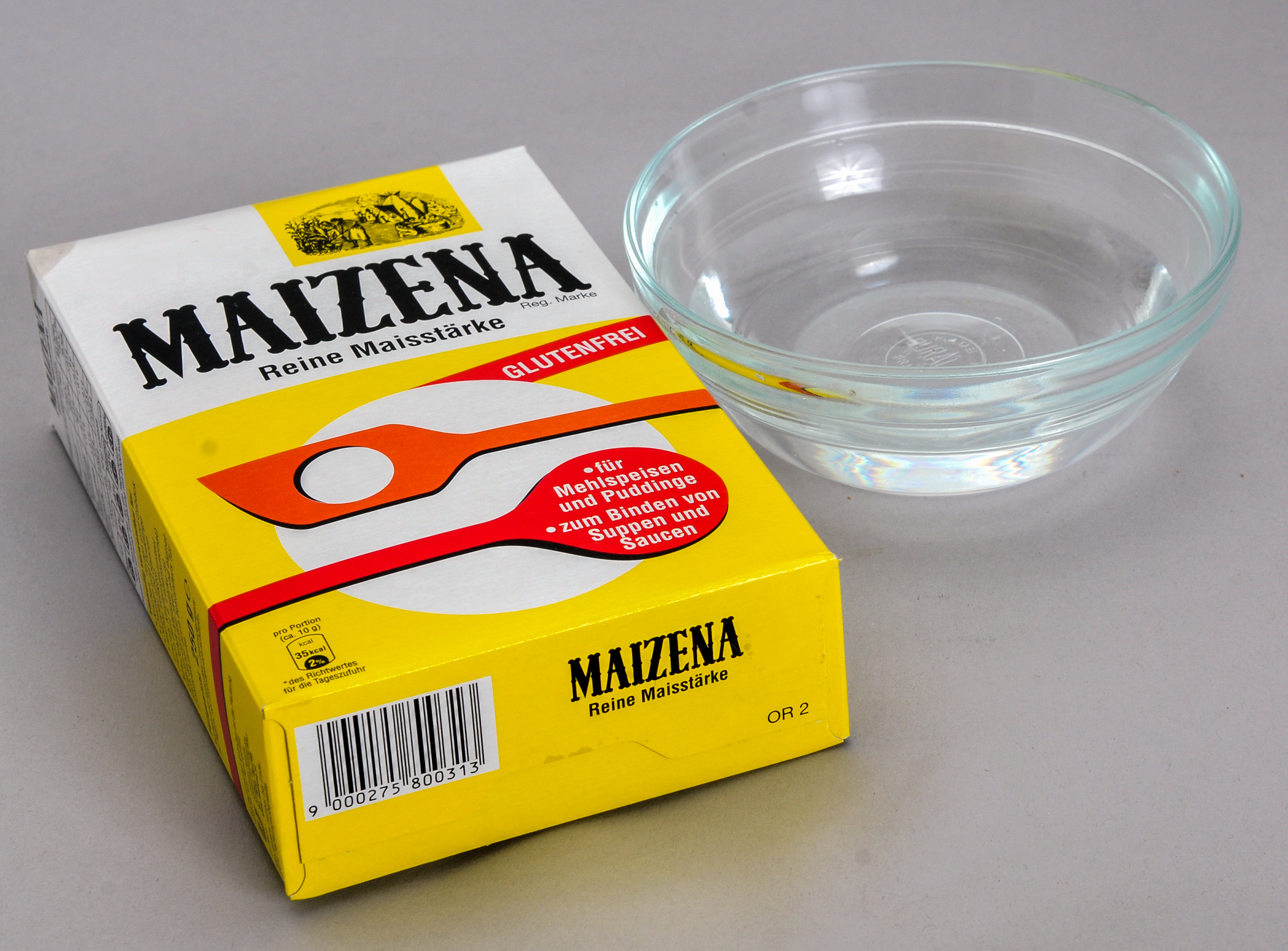 Treffen der Redaktion Essen und Trinken ion Wien